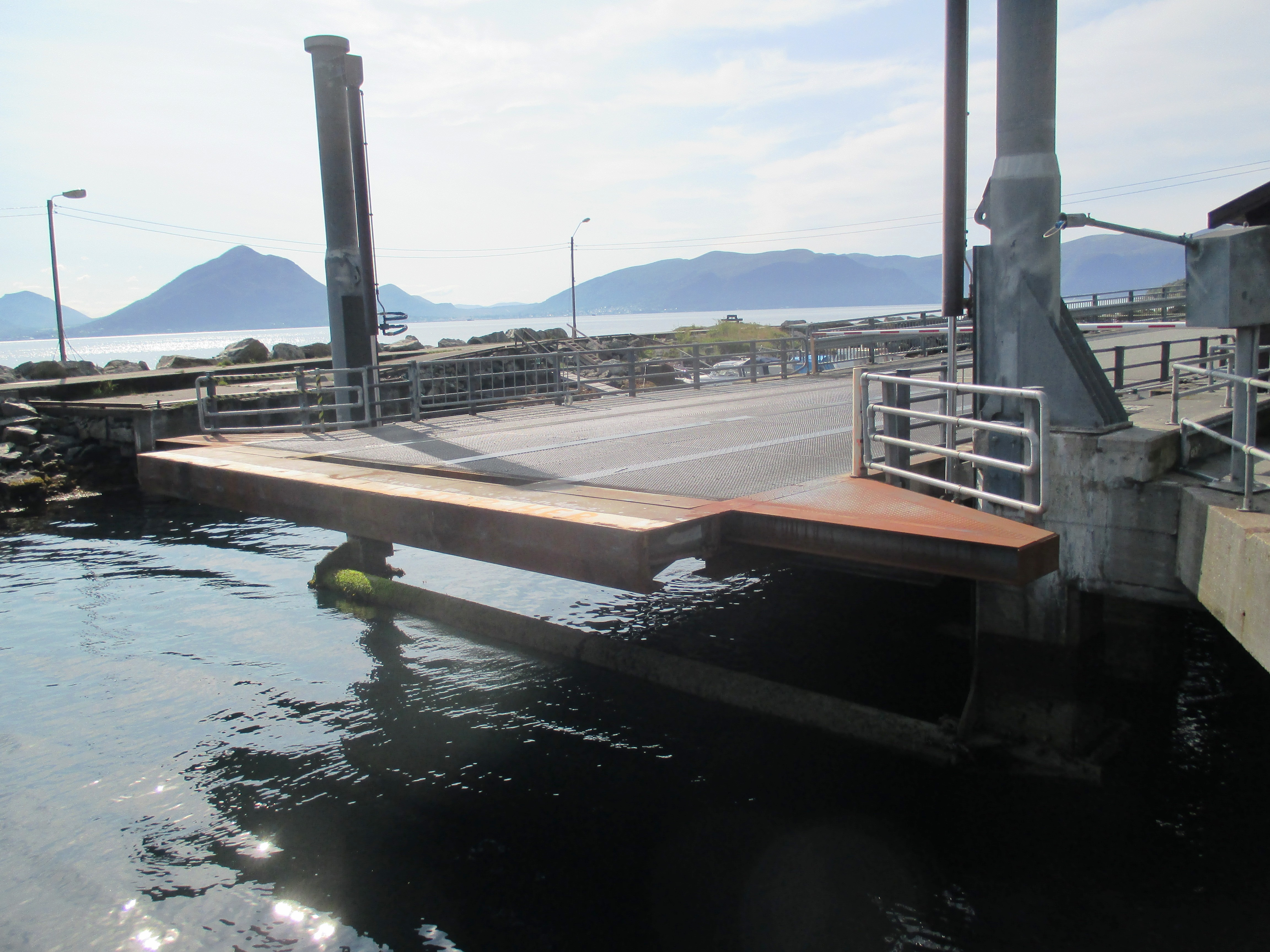 Sulesund fergekai